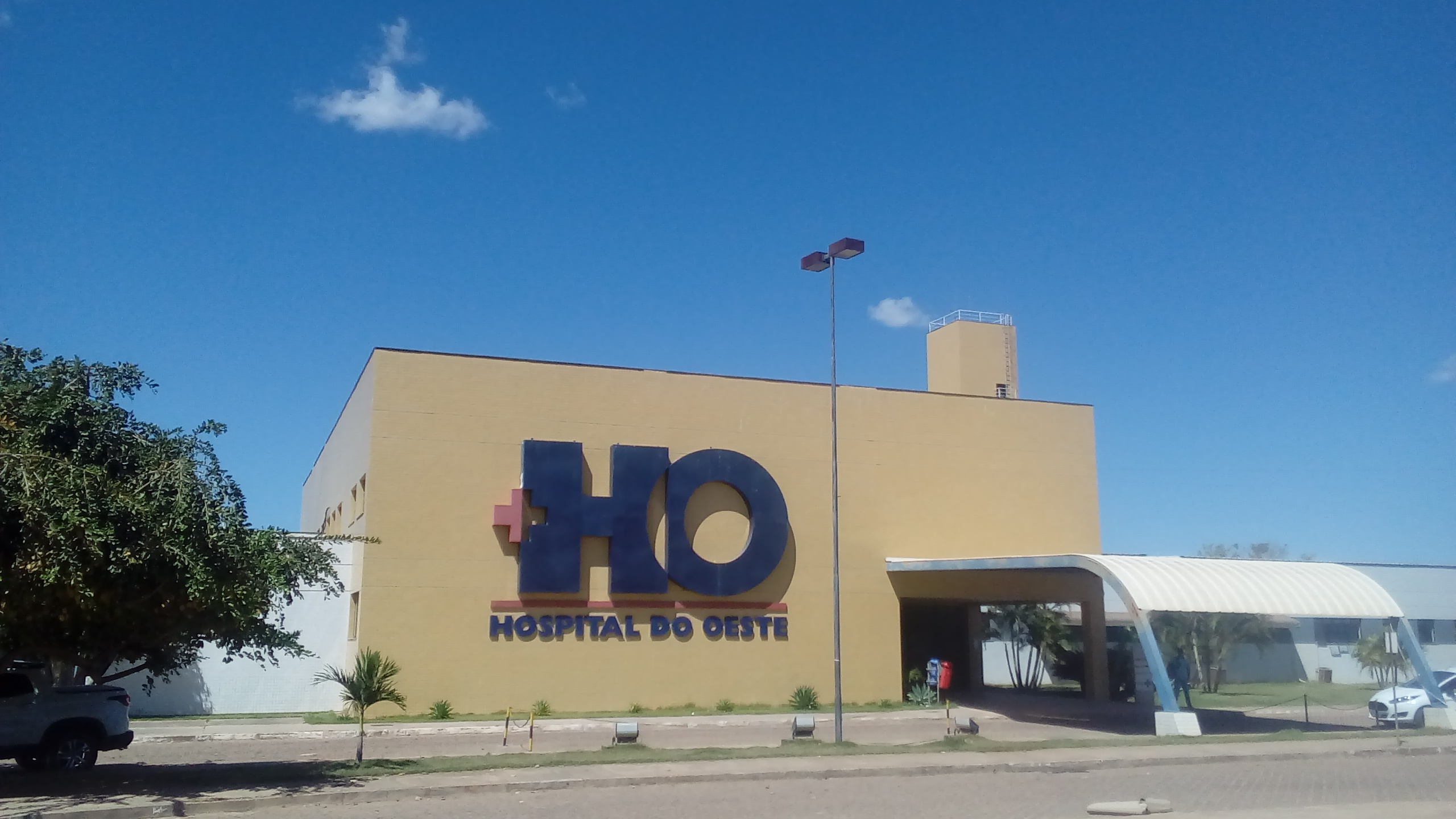 Hospital do Oeste em Barreiras Bahia Brasil